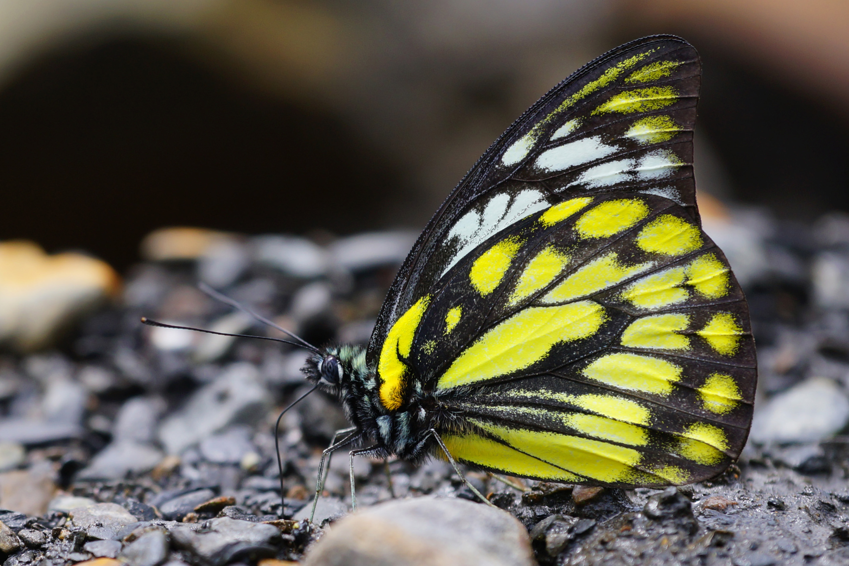 鋸粉蝶 Prioneris thestylis formosana